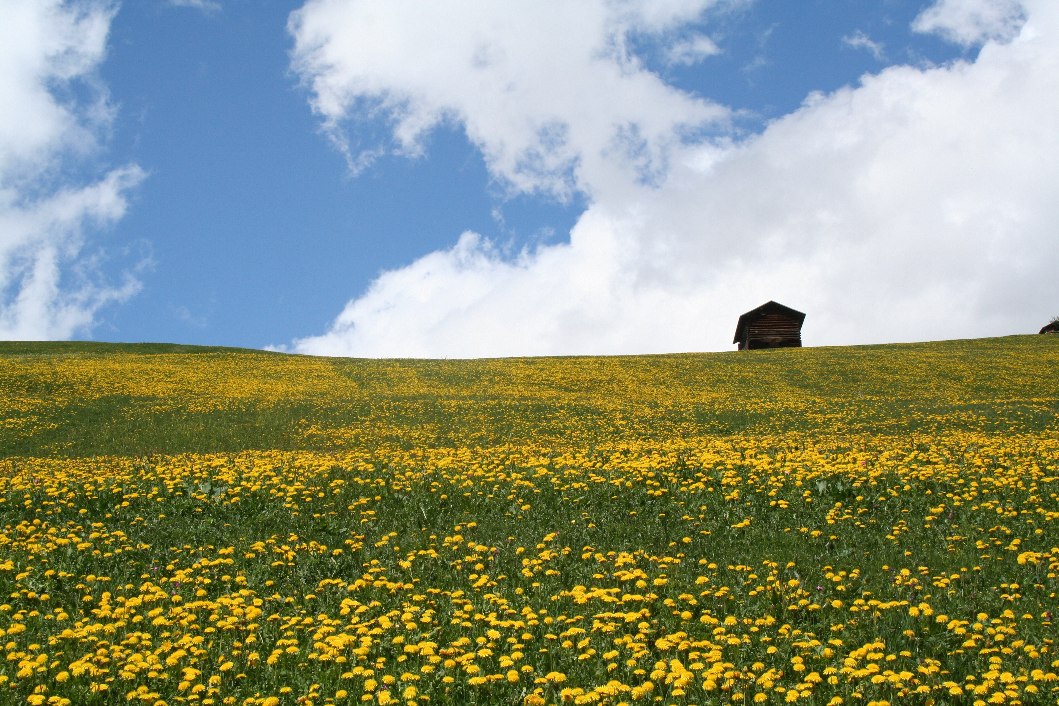 Stall oberhalb Falera